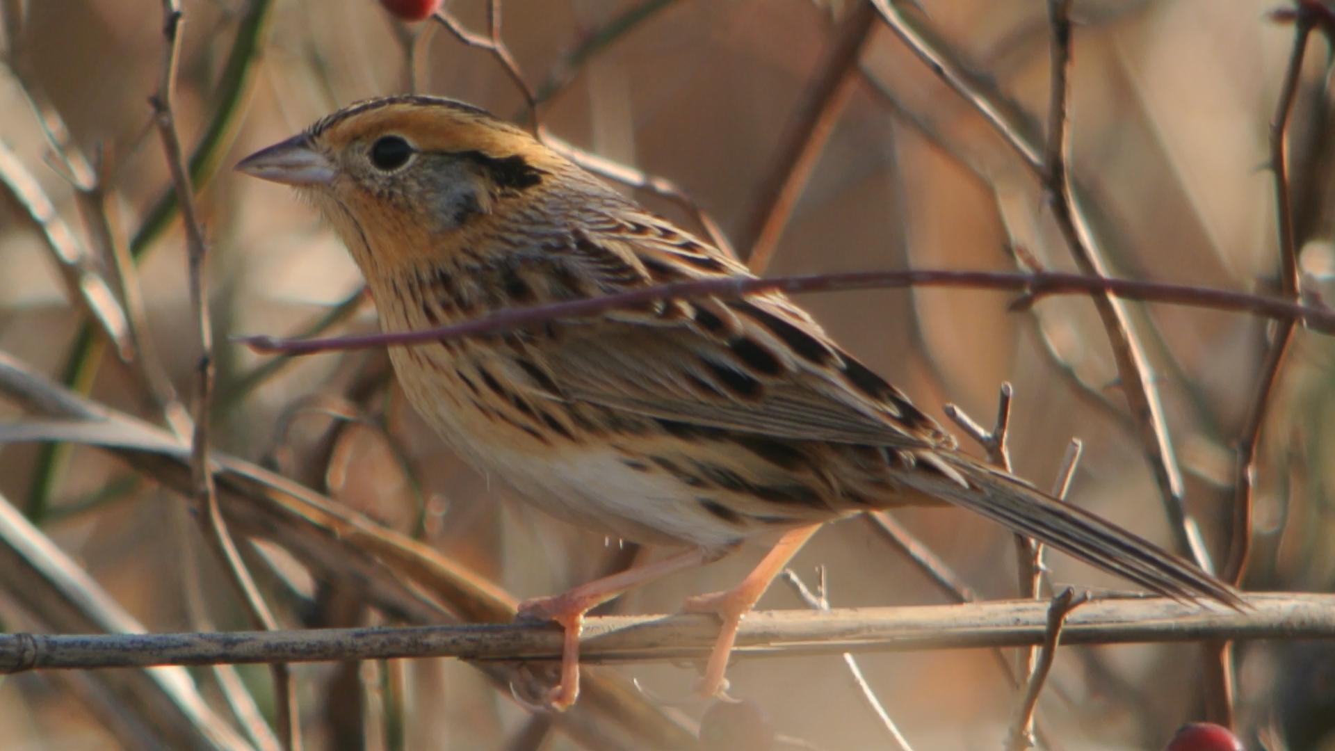 Hazel Hill Lake MO - grabbed from video - 11/17/12